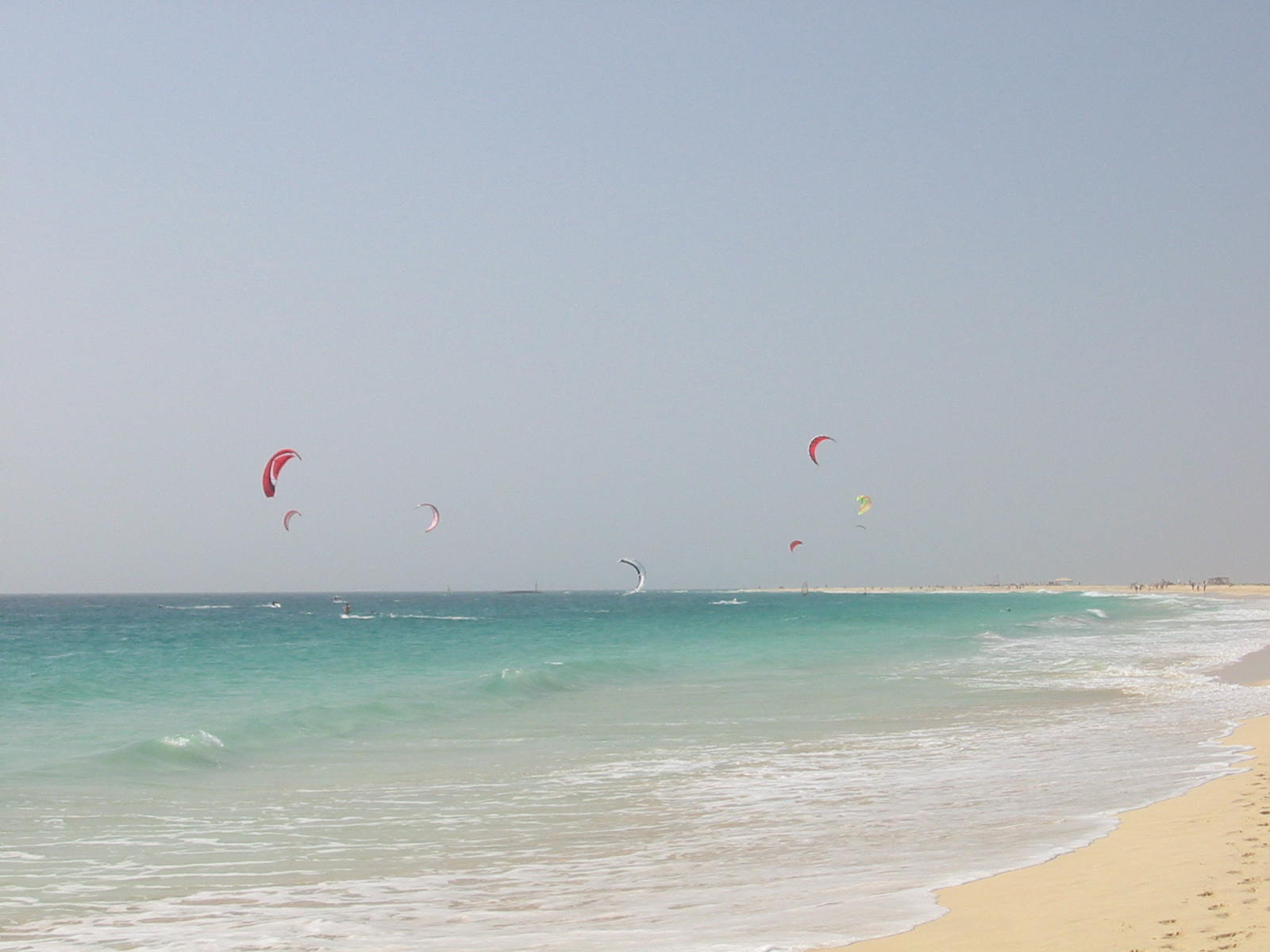 sal cape verde santa maria